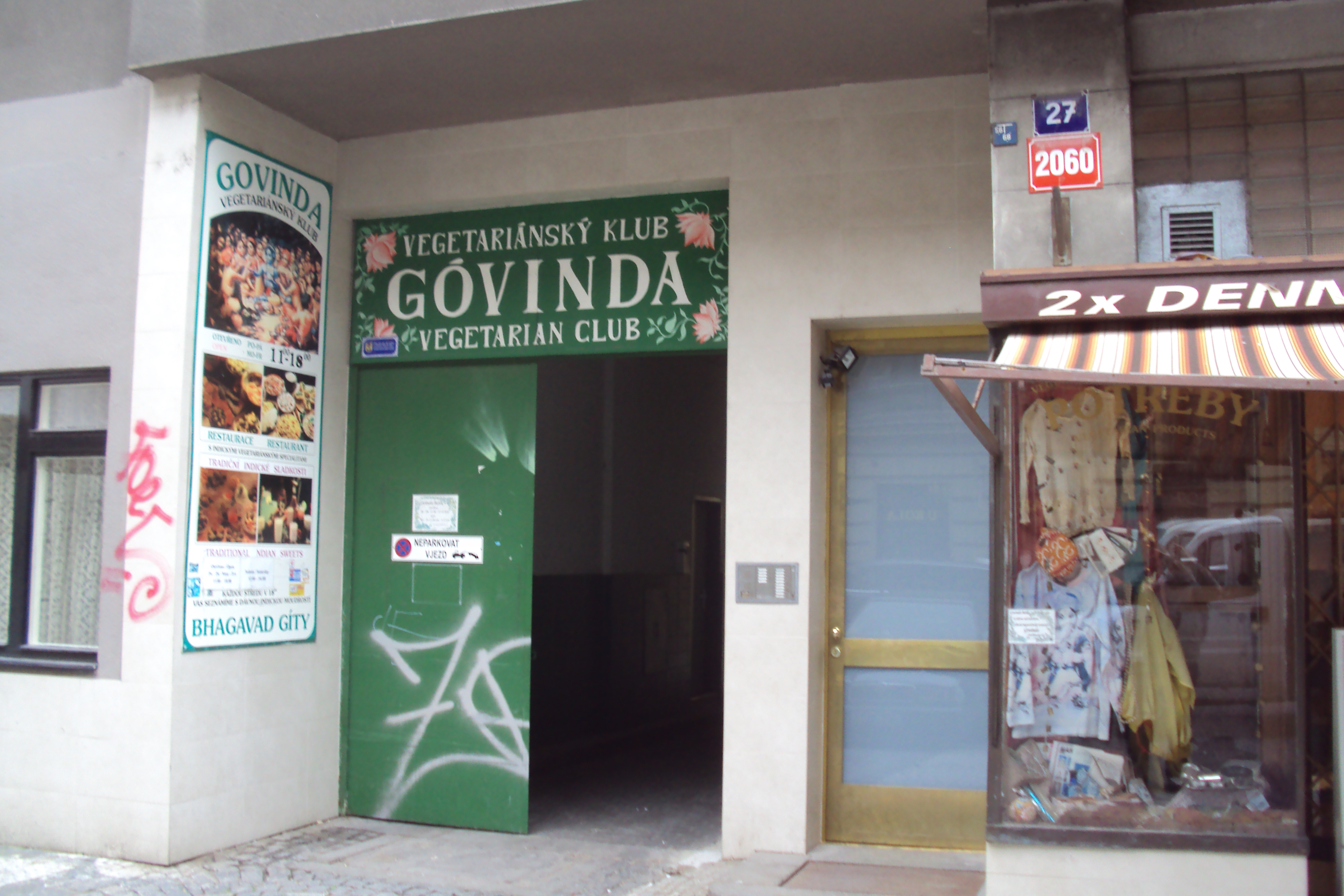 Restaurace Harre Kršna v Praze 1